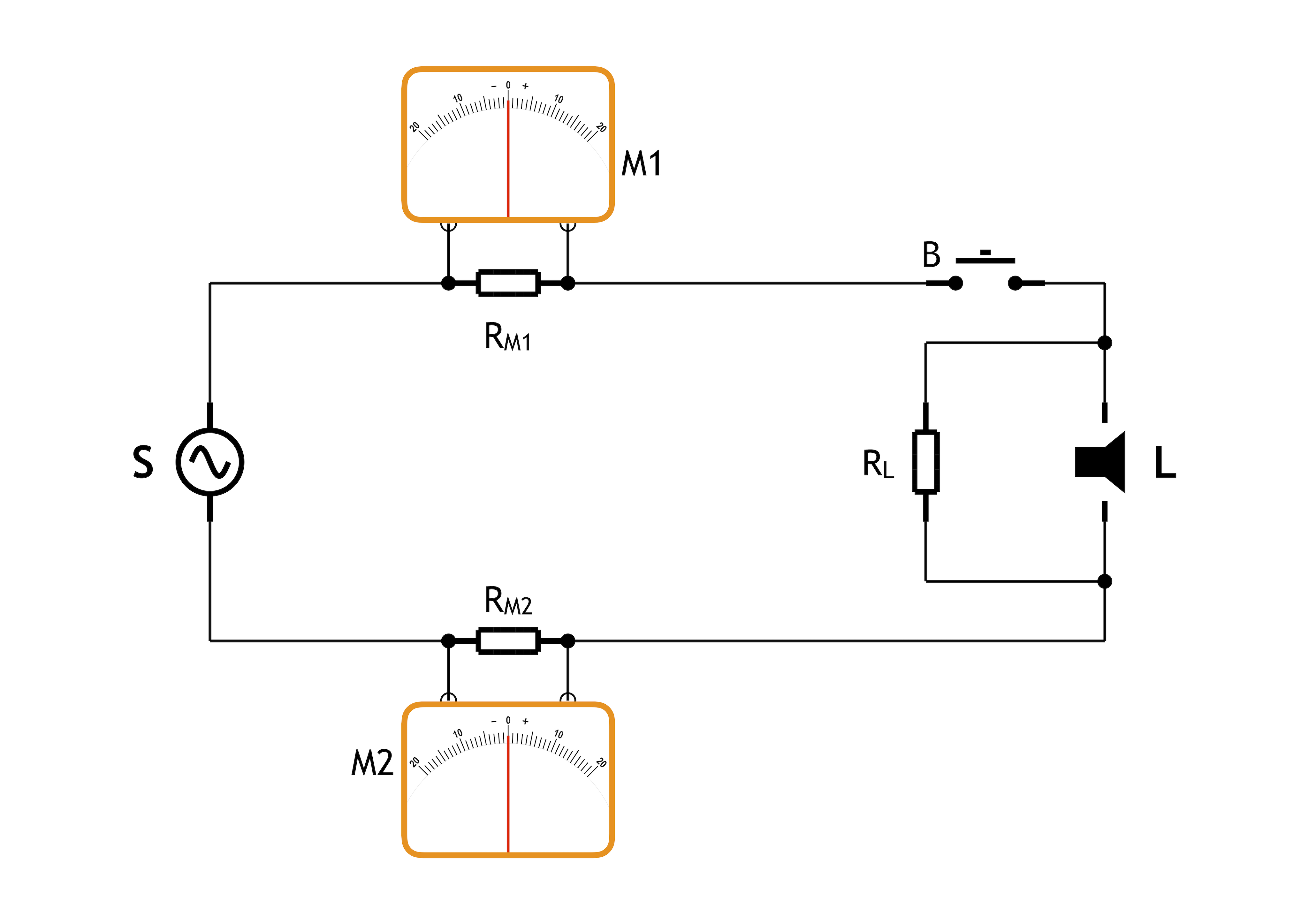 AC spenningskilde med instrument-shunt og høyttaler med belastingsshunt